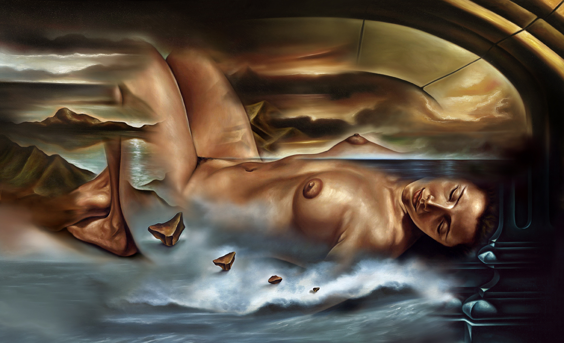 Oleo sobre lienzo. 160x100cm Colección privada.